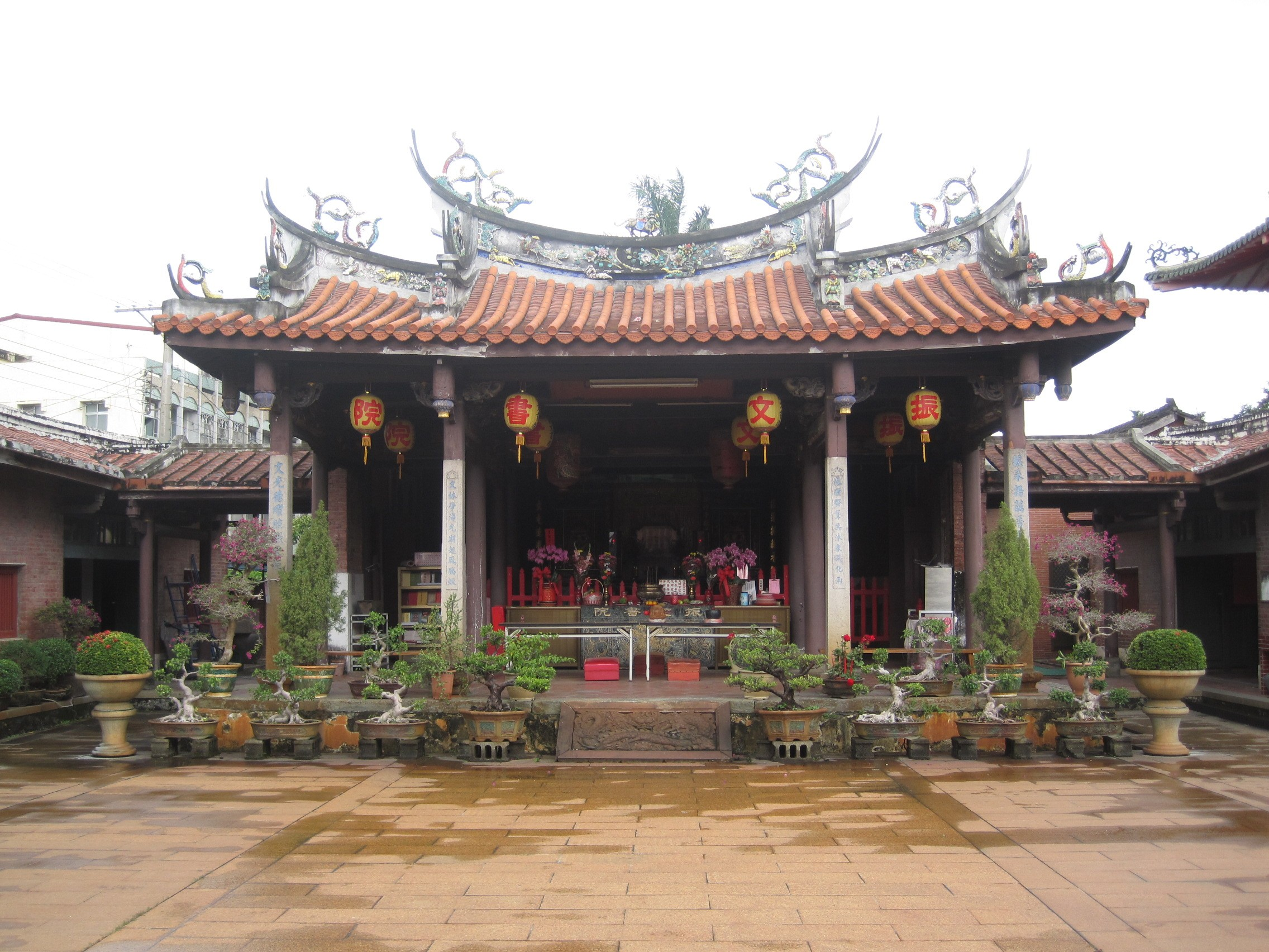 西螺振文書院正殿